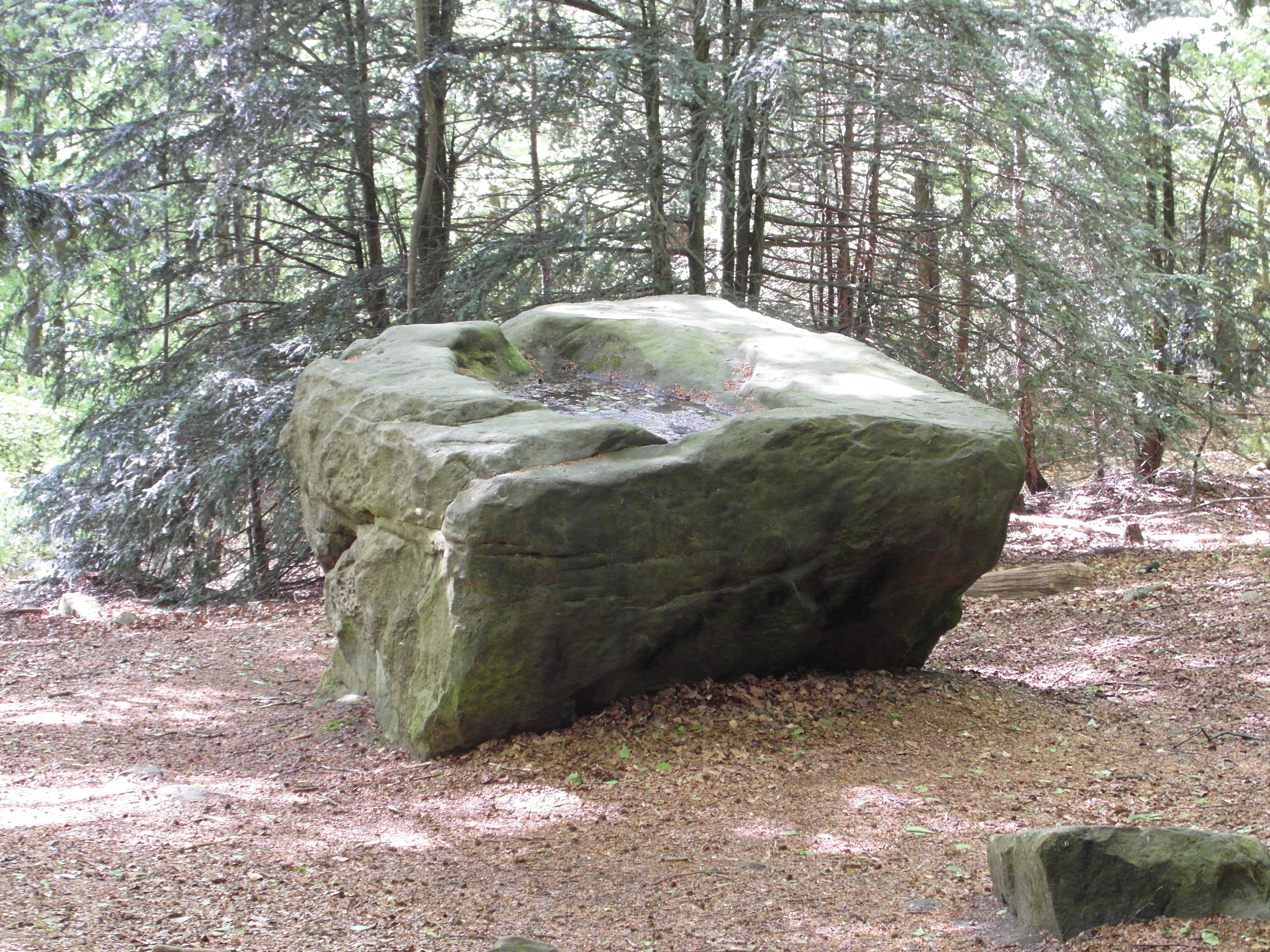 Naturdenkmal ND-SHG 00006 Alte Taufe im Deister bei Lauenau. Ostansicht.